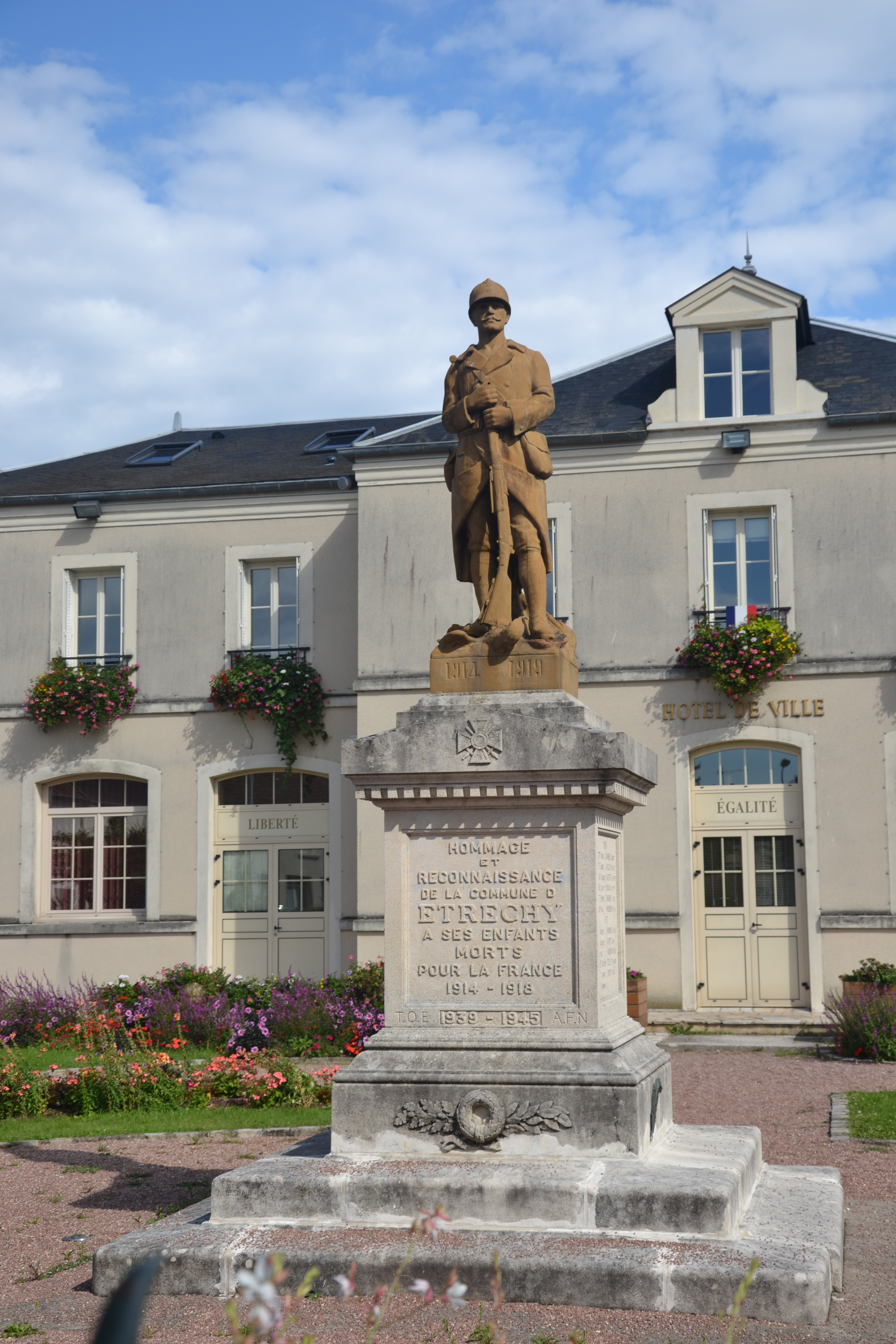 monument aux morts d'Étréchy (Essonne)